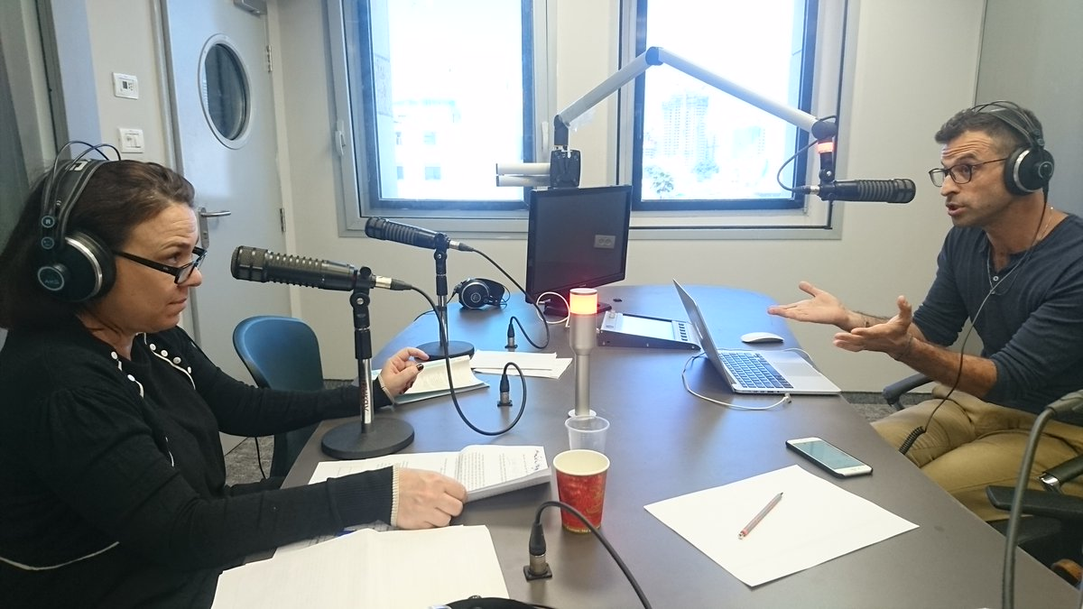 מיה סלע